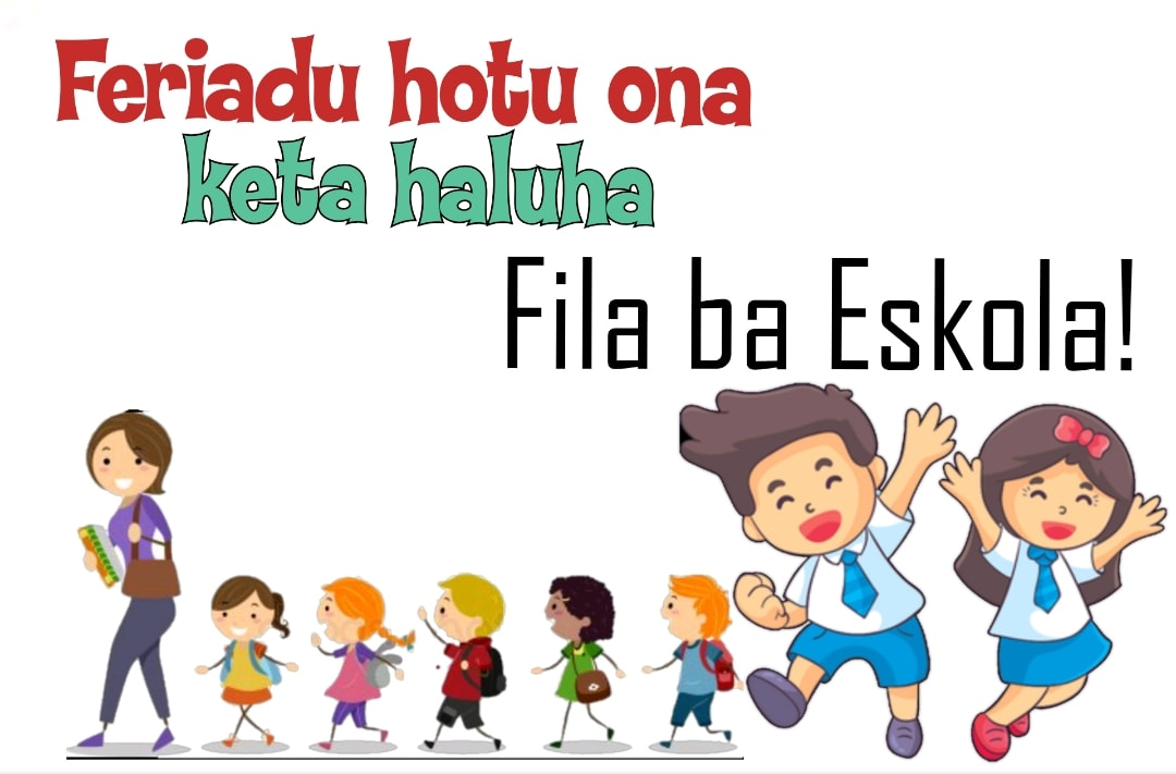 Ferien sind zu Ende - Nicht vergessen - Kinder in die SchuleTetun: Feriadu hotu ona. Keta haluha. Fila ba eskola!